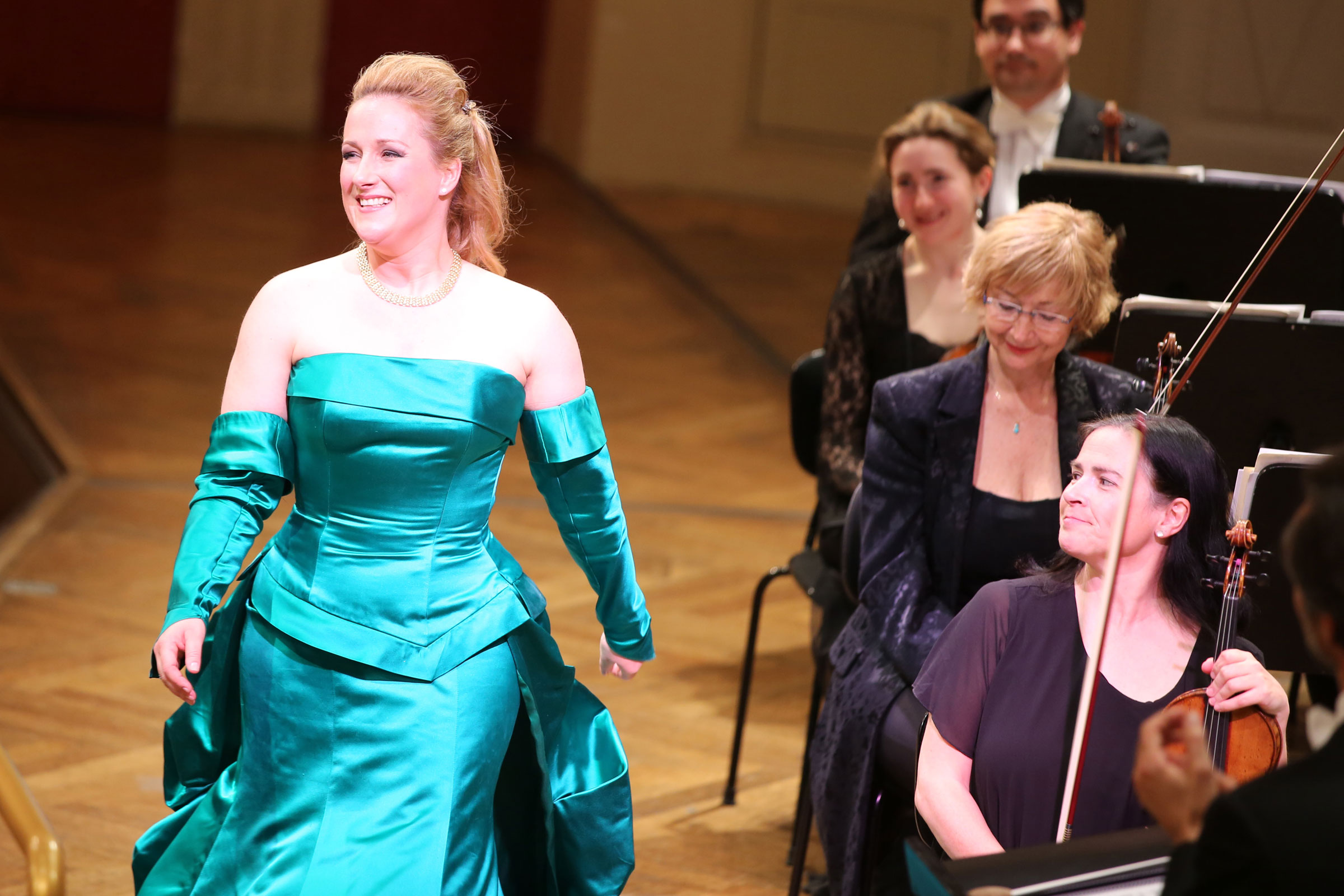 Diana Damra, Sopran